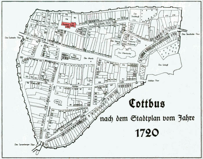 Stadtplan von Cottbus aus dem Jahr 1720, die Wendische Kirche rot hervorgehoben